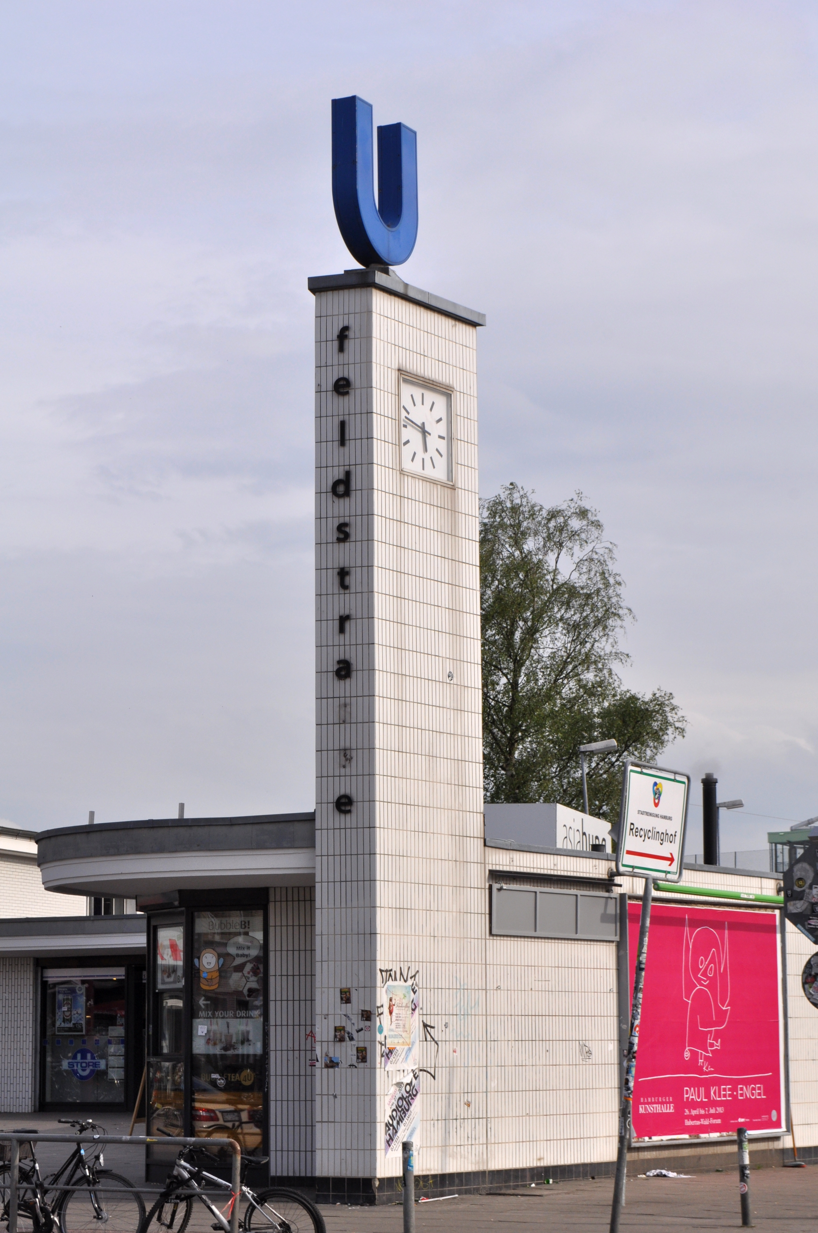 Säule am U-Bahnhof Feldstraße in Hamburg-St. Pauli. This is a photograph of an architectural monument.